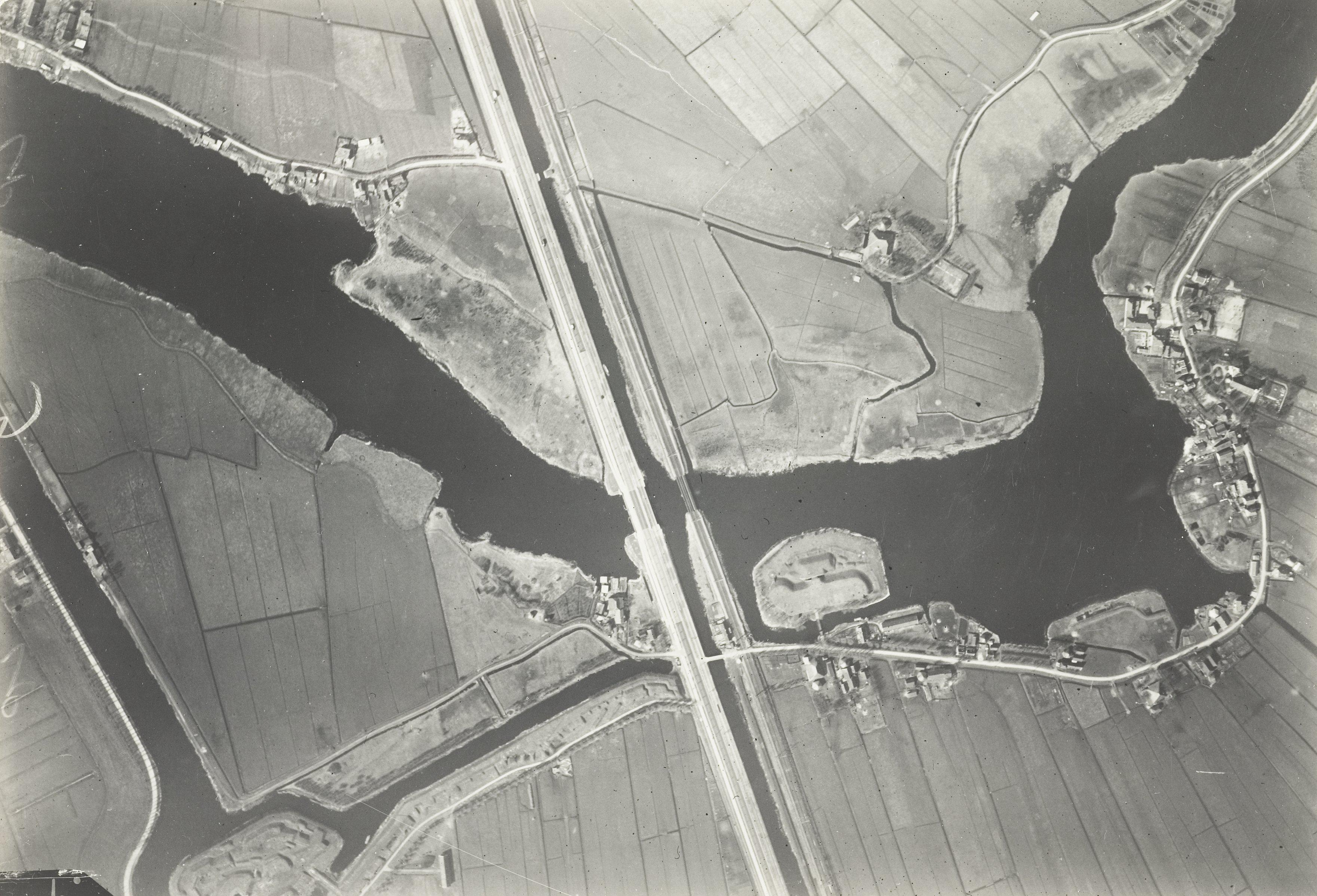 Luchtfoto van de positie De Liede, met het Fort De Liede, de wal tussen Fort De Liede en Fort bij de Liebrug.